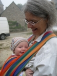 Bebo en ŝultrotuko